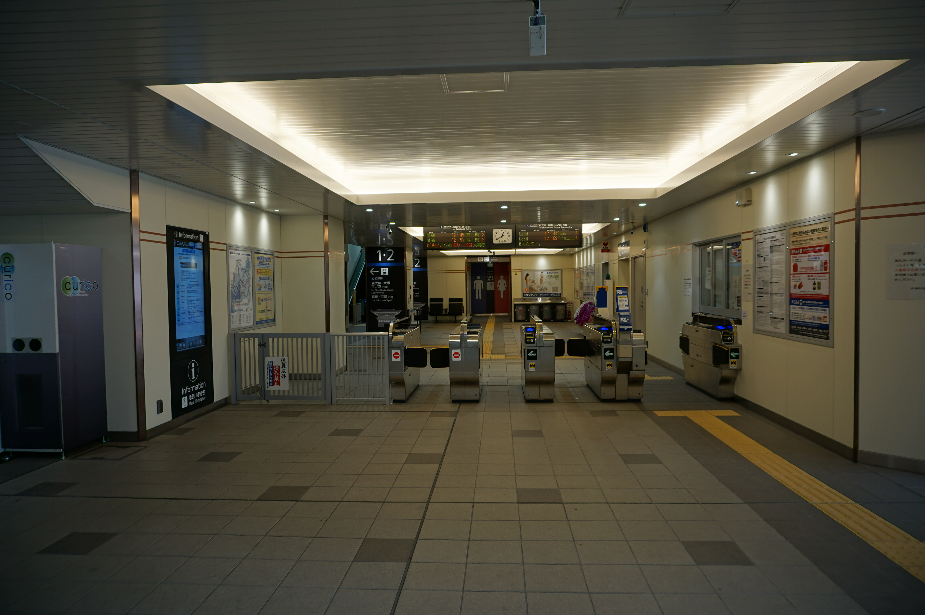 改札口（2018年4月17日）